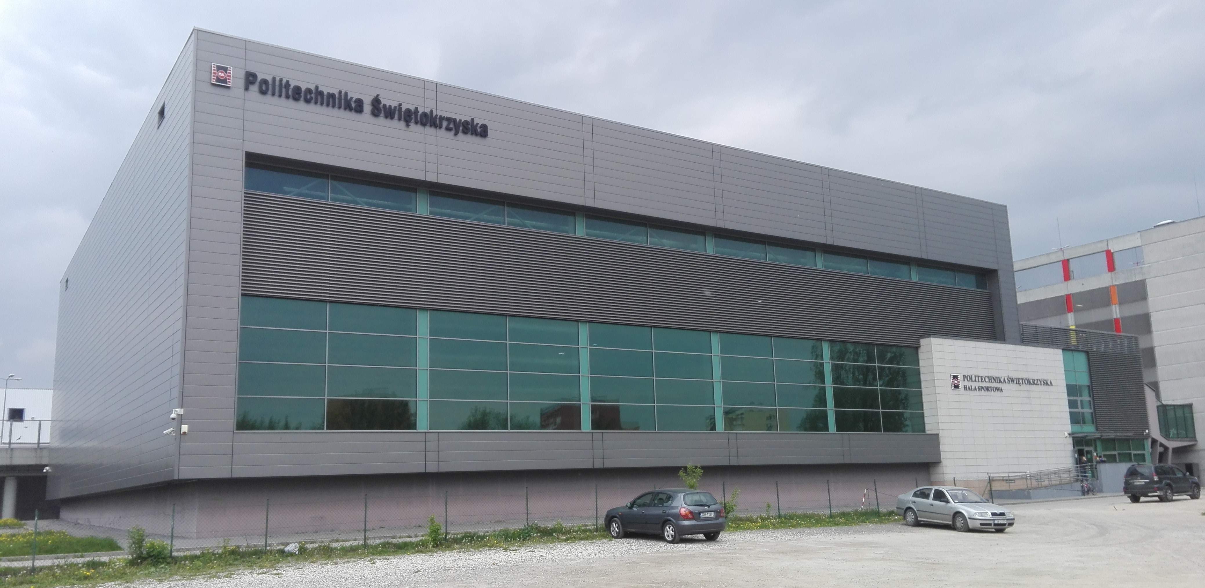 Hala sportowa Politechniki Świętokrzyskiej (otwarta w 2010 r.)